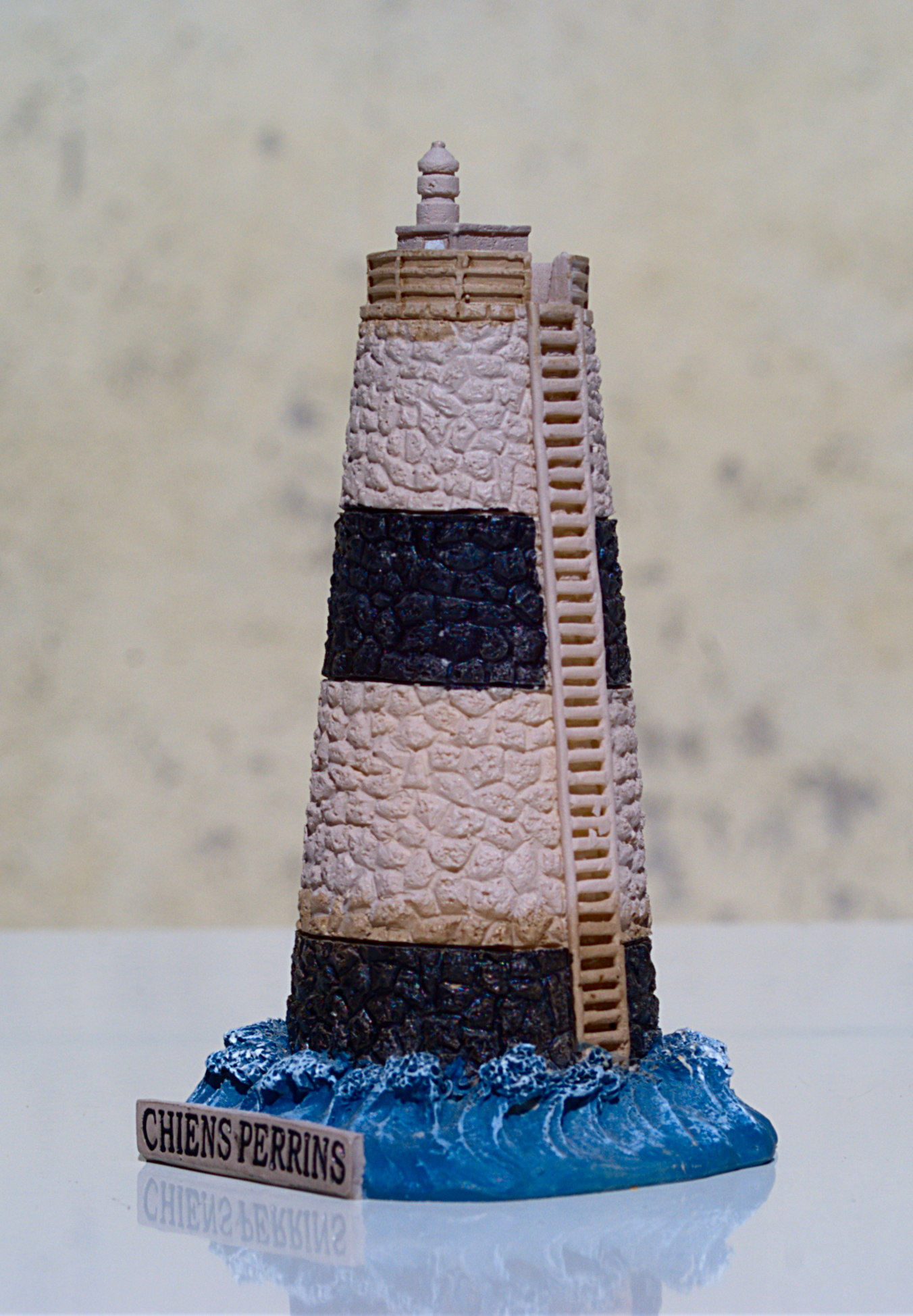 Miniature de la tourelle-balise des Chiens Perrins, Île d'Yeu (Vendée, Pays de Loire, France)